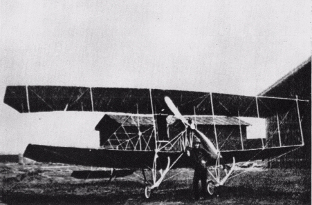 Samolot Zbierański i Cywiński na lotnisku Awiata. Przed samolotem Czesław Zbierański.